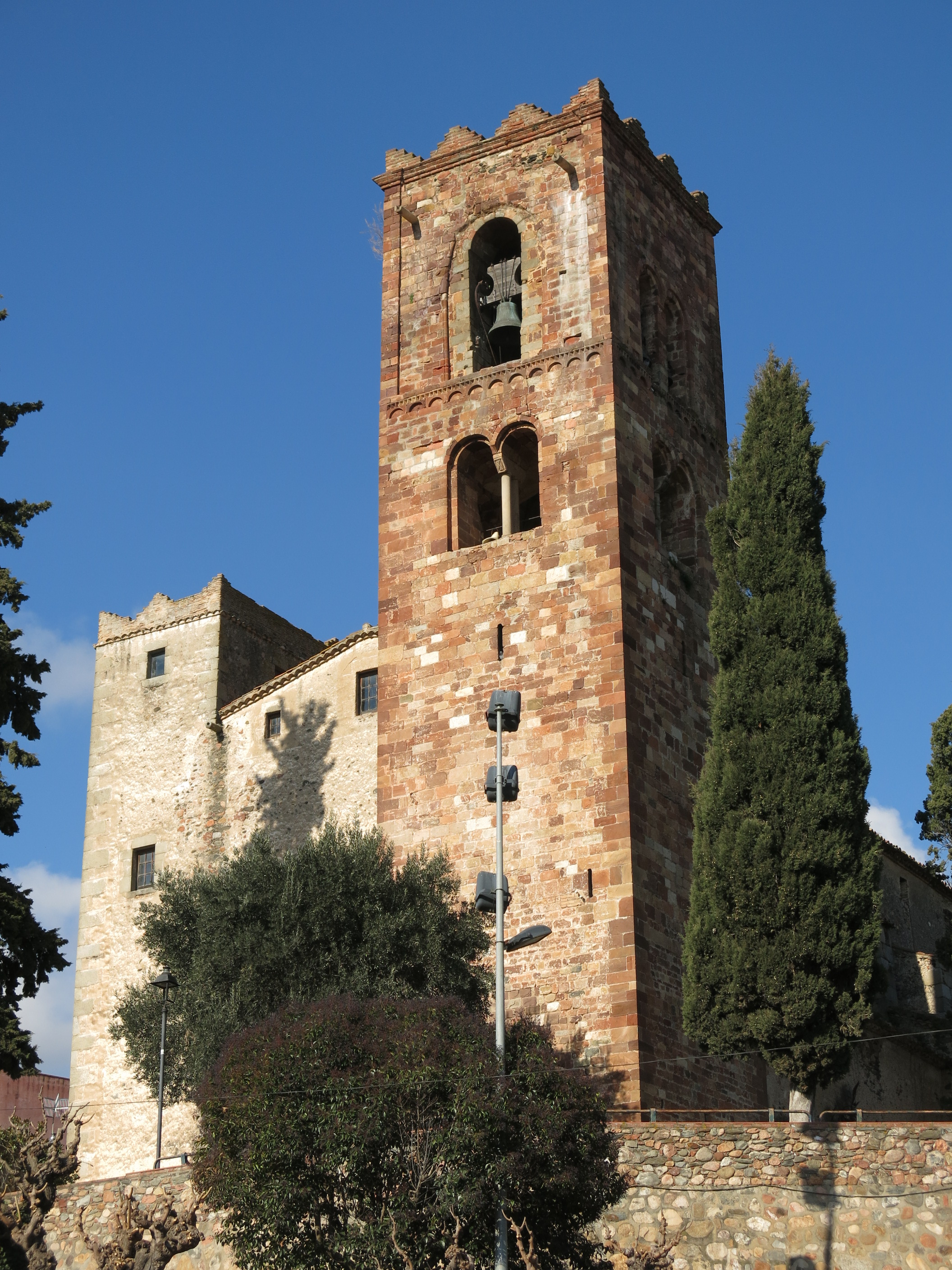 Església parroquial de Sant Pere (Sant Pere de Vilamajor)